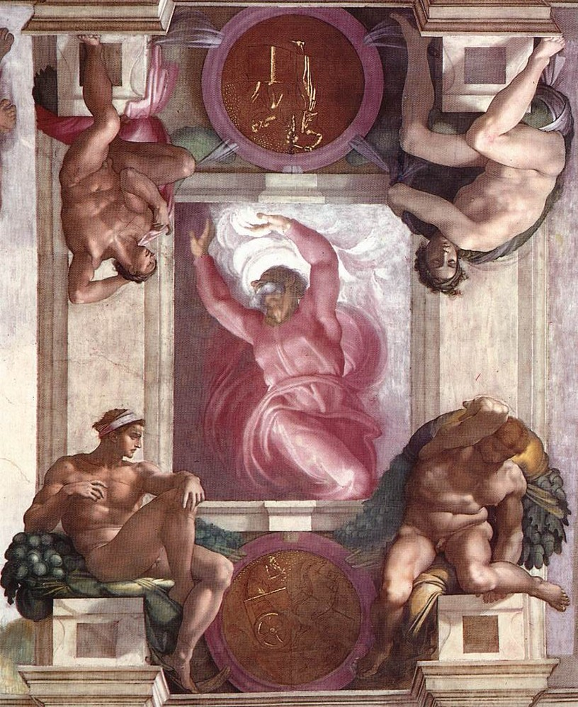 Sistine Chapel, fresco Michelangelo